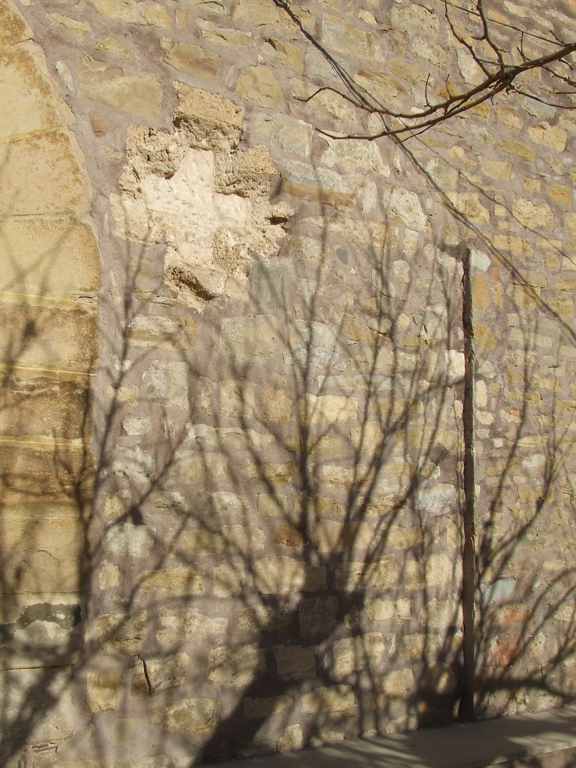 Traces medievals a Sant Salvador de Toló (Gavet de la Conca, Pallars Jussà)